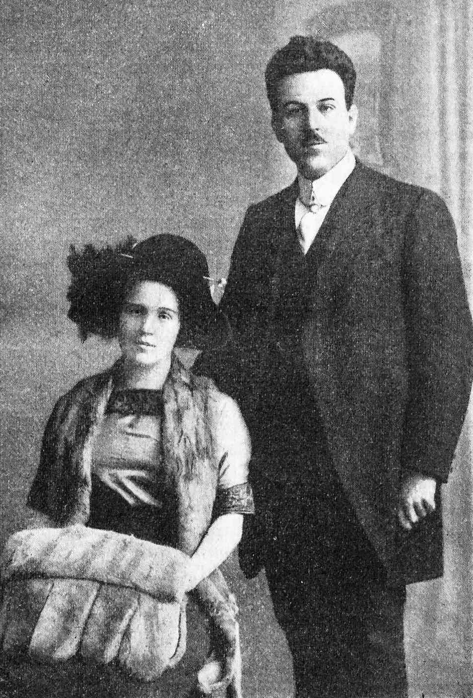 Gesinjoroj Privat en Moskvo, 1912